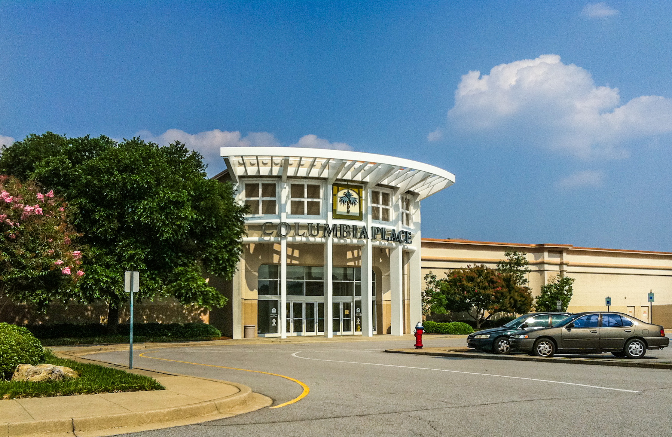 Columbia Place Mall